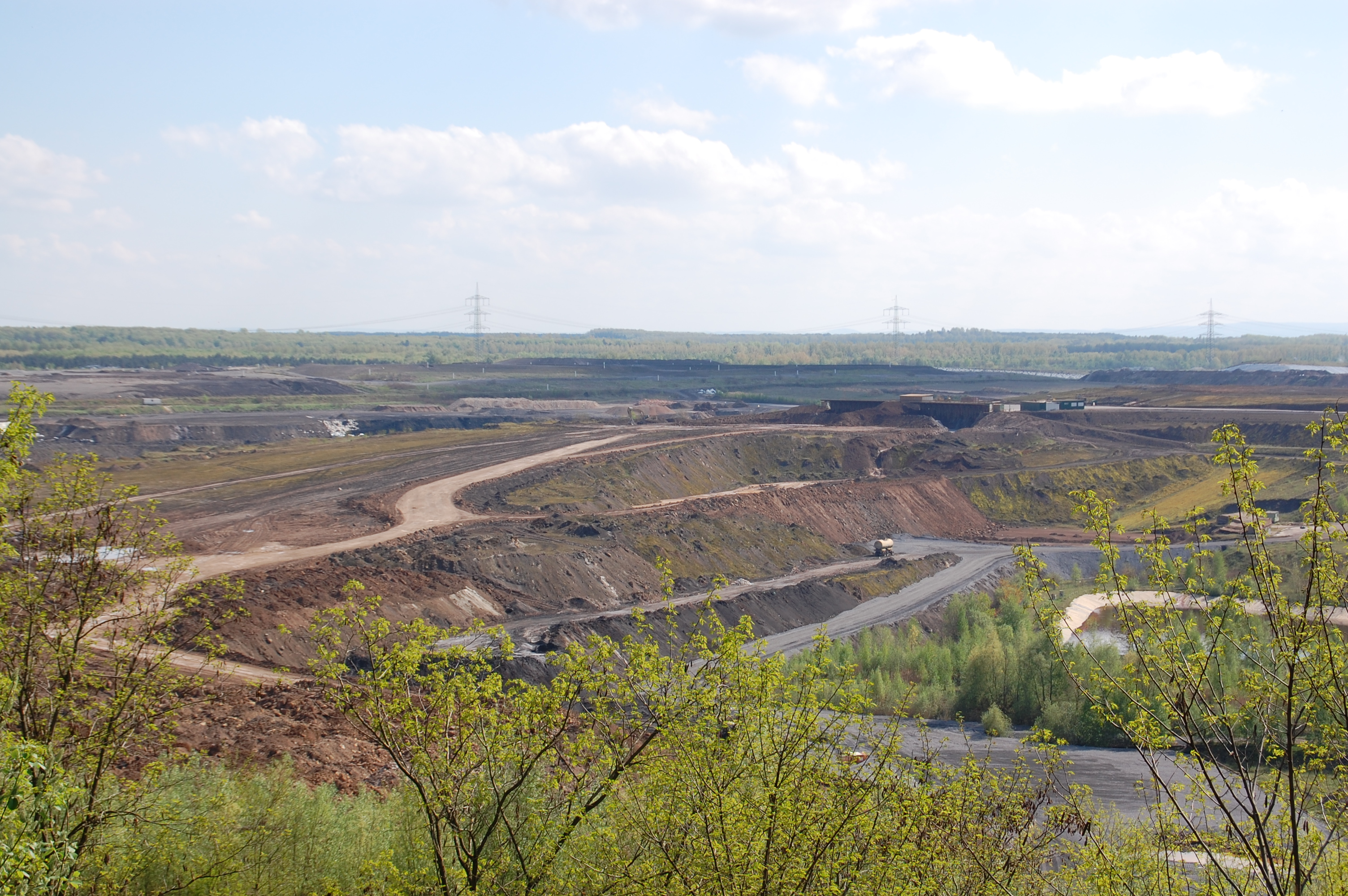 Ehemaliges Braunkohle-Abbaugebiet Vereinigte Ville, Huerth, Germany